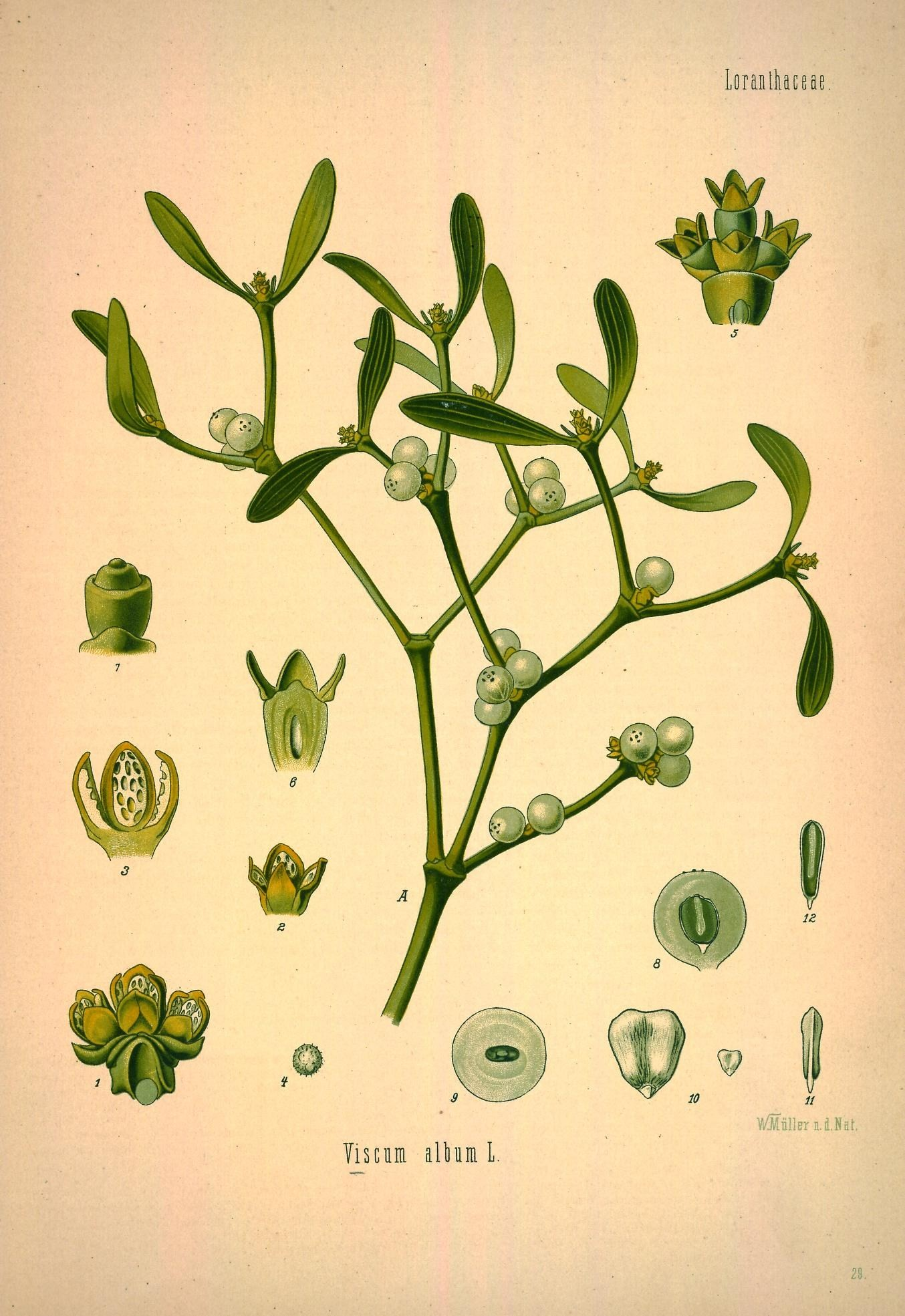 Weiße Mistel. A Zweig der weiblichen Pflanze mit Blüthen und Früchten, natürl. Grösse; 1 männlicher Blüthenstand vergrössert; 2 männliche Blüthe, desgl.; 3 dieselbe im Längsschnitt, desgl.; 4 Pollen, desgl.; 5 weiblicher Blüthenstand desgl.; 6 weibliche Blüthe, zerschnitten, desgl.; 7 dieselbe ohne Perigon, desgl.; 8 Beere im Längsschnitt, desgl.; 9 dieselbe im Querschnitt, desgl.; 10 Same, natürl. Grösse und vergrössert; 11 derselbe von der Seite, vergrössert; 12 derselbe von der Seite im Längsschnitt, desgl.